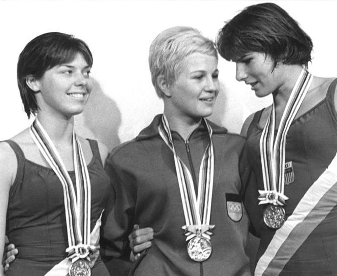 Zentralbild-Kohls Ka-Ri 18.10.1964 XVIII. Olympische Sommerspiele in Tokio 1964 Goldmedaille für Ingrid Engel-Krämer.Im Kunstspringen der Damen sicherte die DDR-Springerin Ingrid Engel-Krämer am 12.10.1964 im National Symposium in Tokio ihren großartigen Erfolg von Rom. UBz.: Nach der feierlichen Siegerehrung v.l.n.r.: Jeanne Collier (Silber, USA) , Ingrid Engel-Krämer und Mary Willard (Bronze, USA)